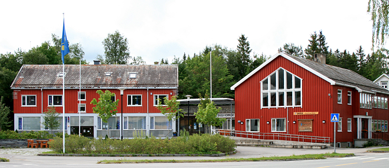 Snåsa kommunehus, Snåsa.